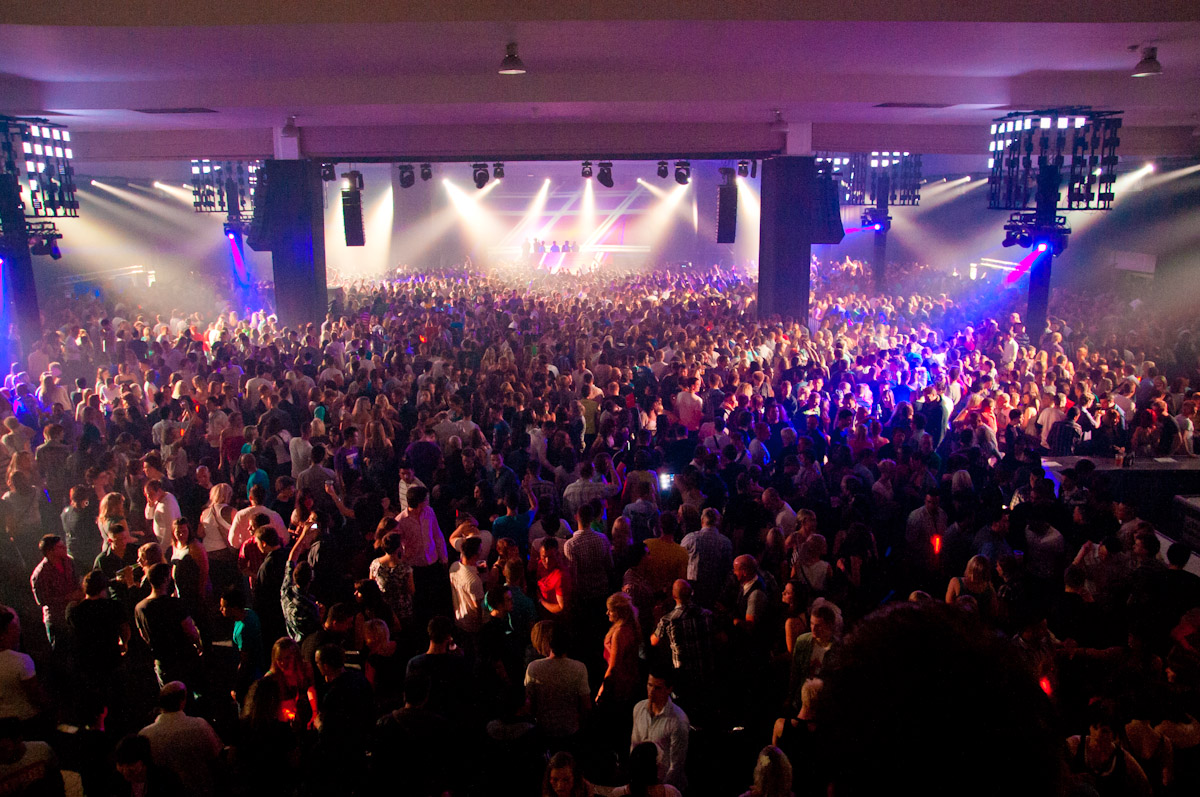 Die Main Hall des Discofestivals 2011